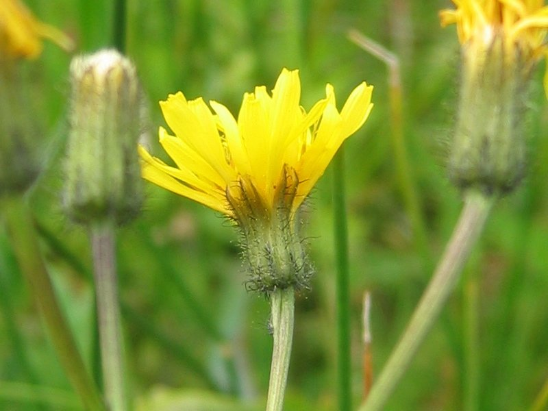 Sumpf-Pippau (Crepis paludosa), Gragetopshof